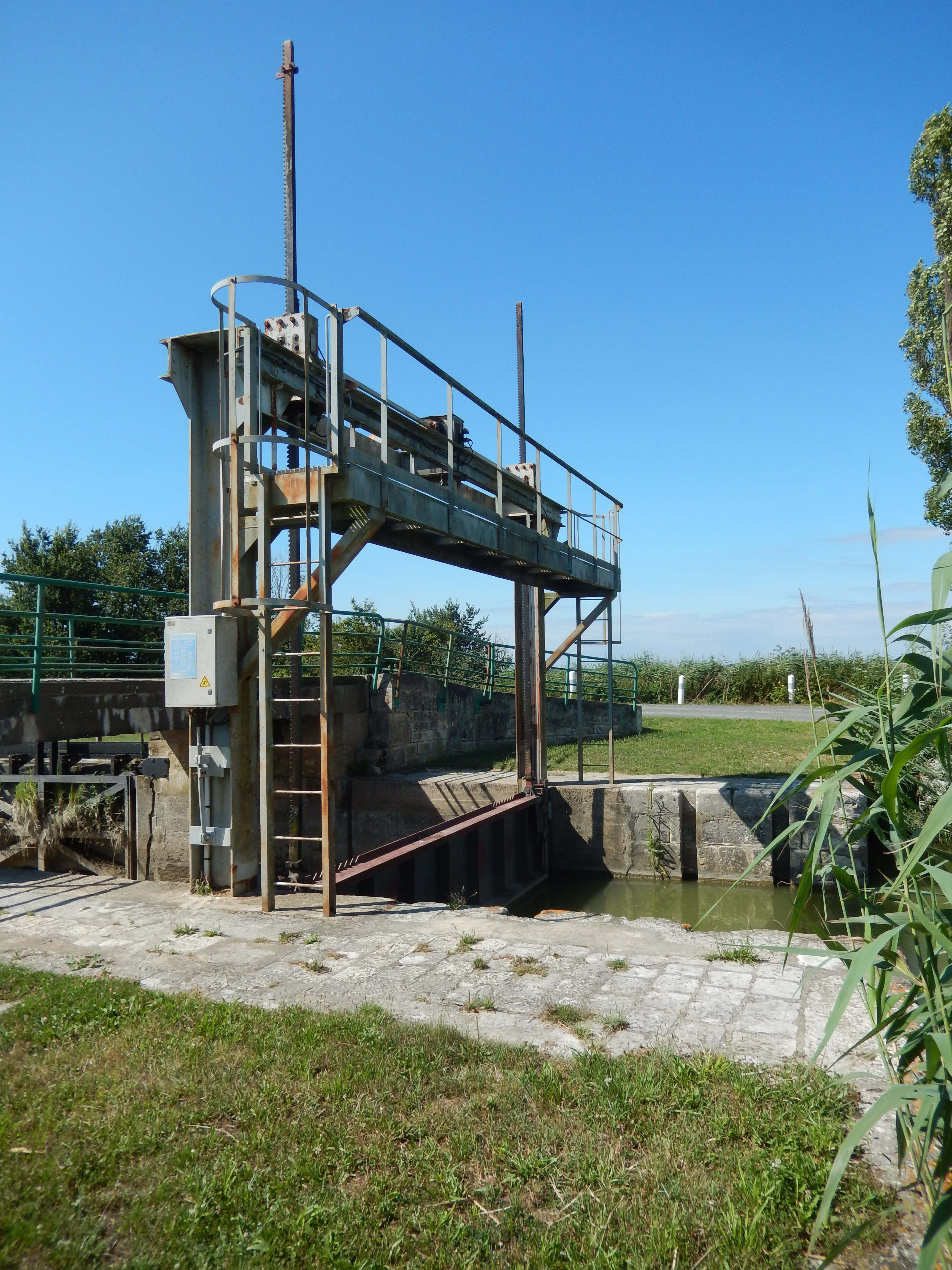 Beaugeay, Charente-Maritime, France. • À l'Est de Beaugeay, une écluse sépare le Canal de Brouage de sa partie la plus en aval, le Havre de Brouage.